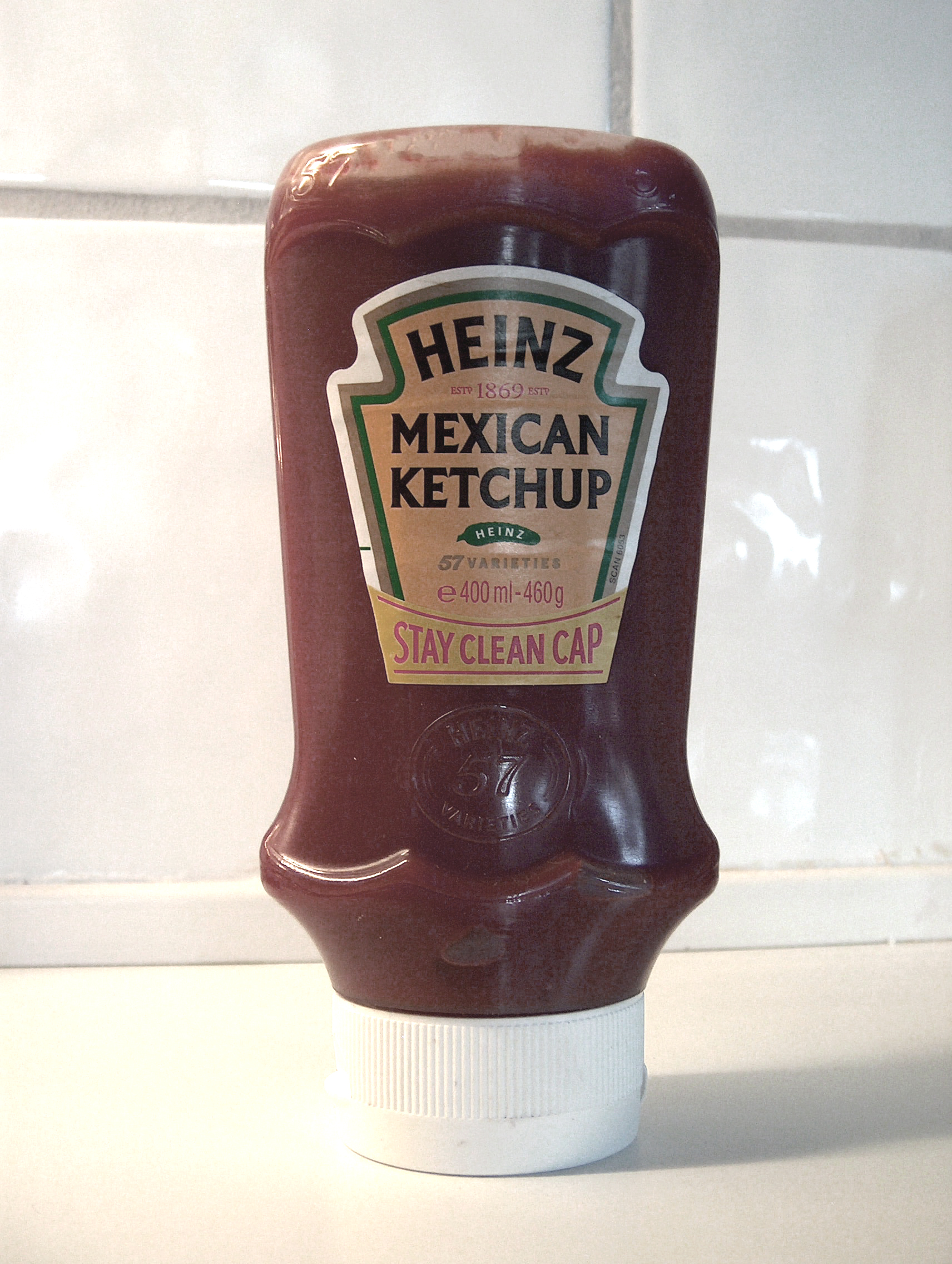 Heinz Mexican Ketchup (Norwegian)